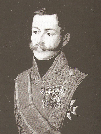 Grabado en blanco y negro del general español José de Canterac (1787-1835), de orígen francés. Murió en 1835 en Madrid en el transcurso de un motín popular.